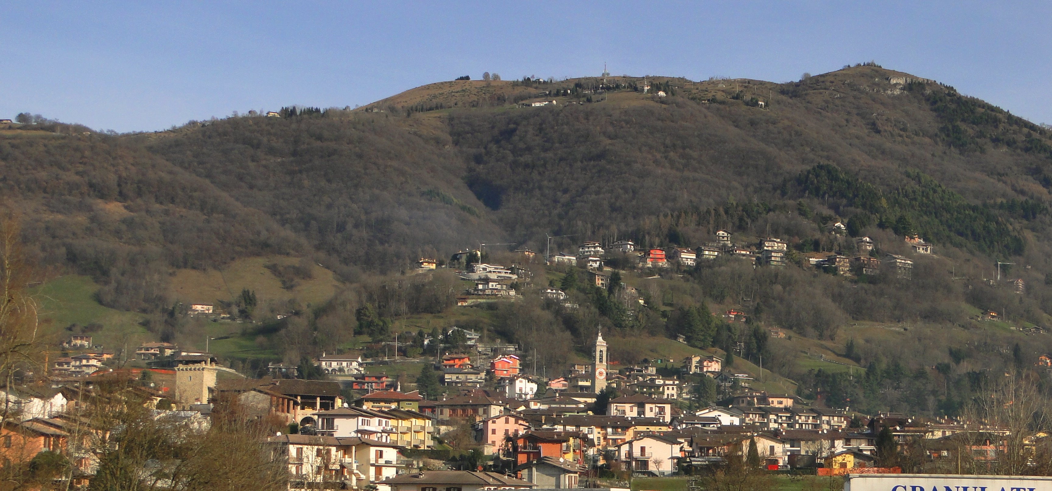 Panorama di Cazzano Sant'Andrea (BG). Italy